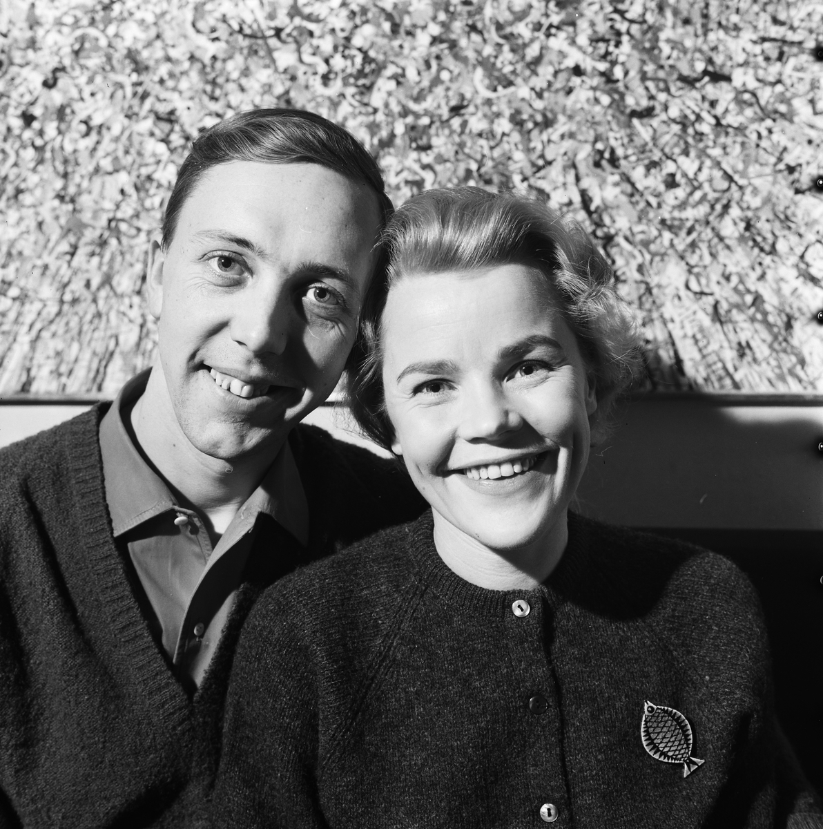 Skuespillerparet Per Theodor Haugen (f. 1932) og Sidsel Sellæg (f. 1928).